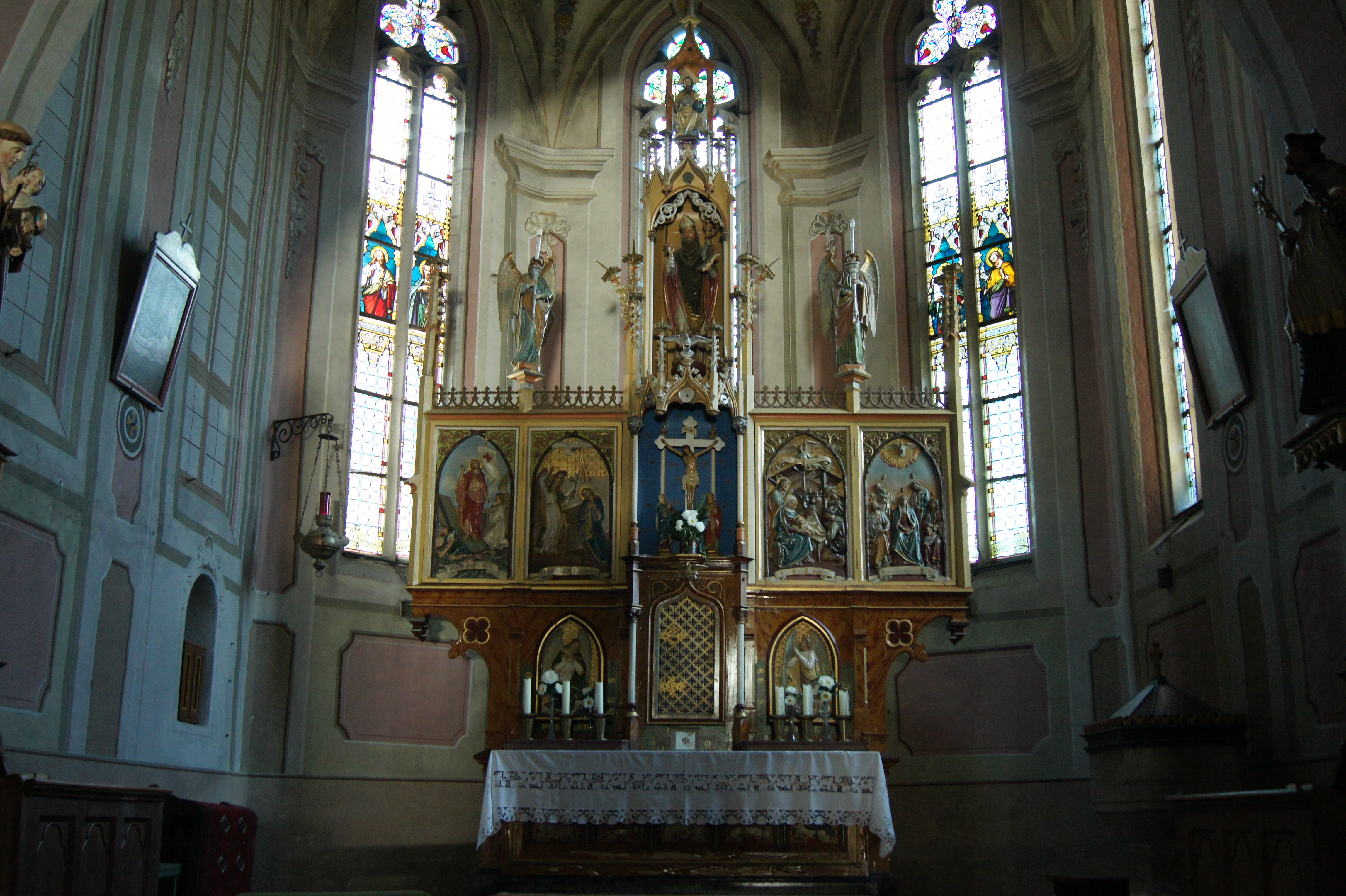 Kath. Pfarrkirche hl. Maximilian, Hauptaltar